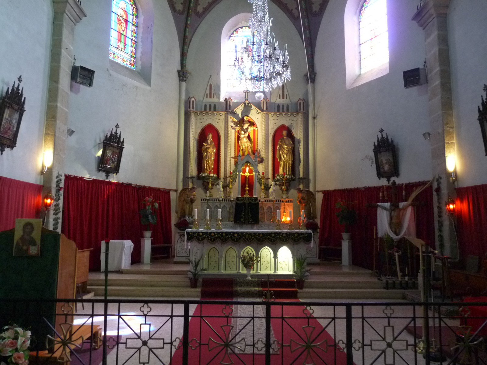 Autel principal, église des Angles, Pyrénées-Orientales, France